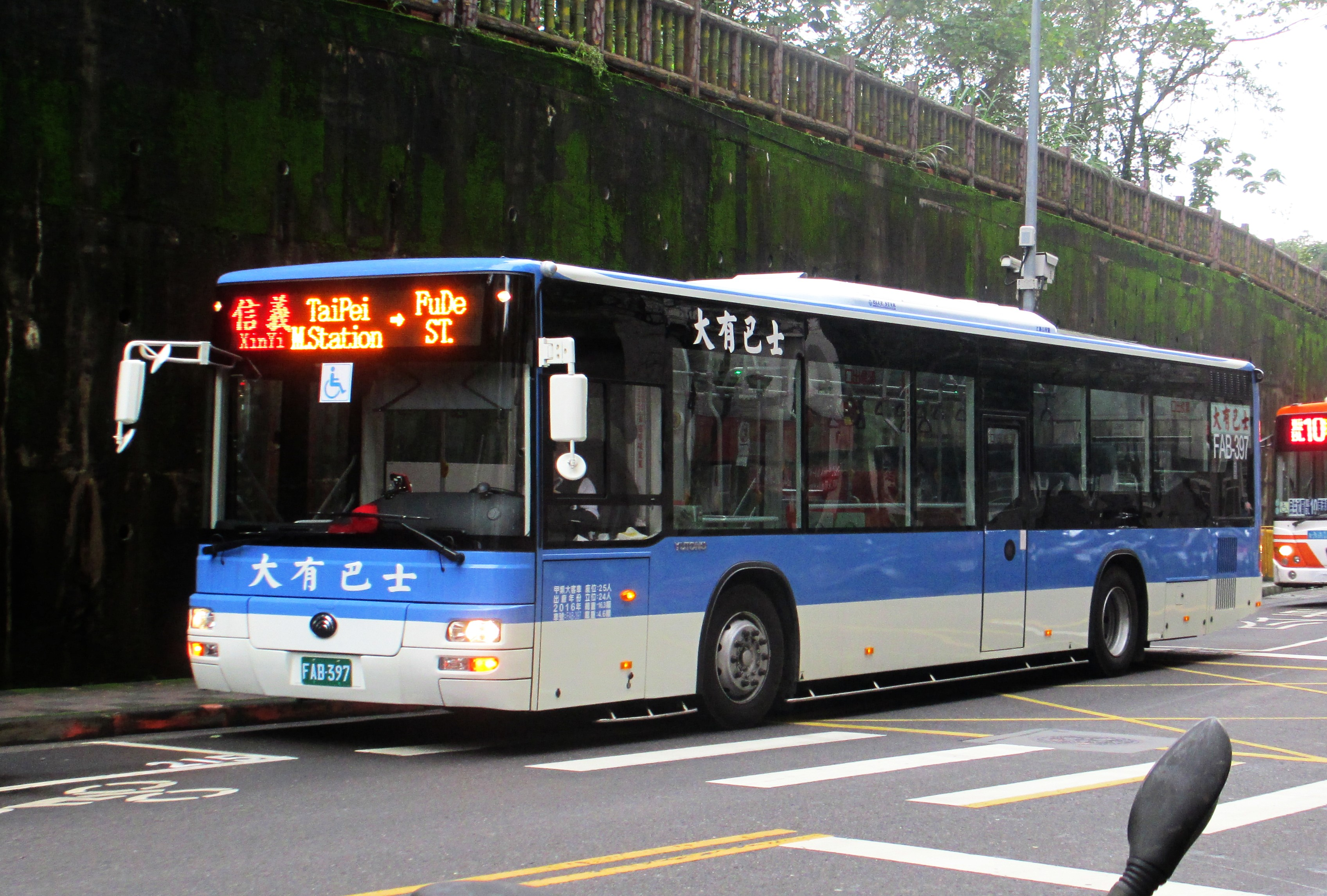 大有巴士2016年台灣宇通低地板公車FAB-397